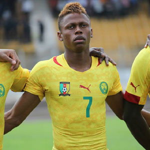 en équipe nationale